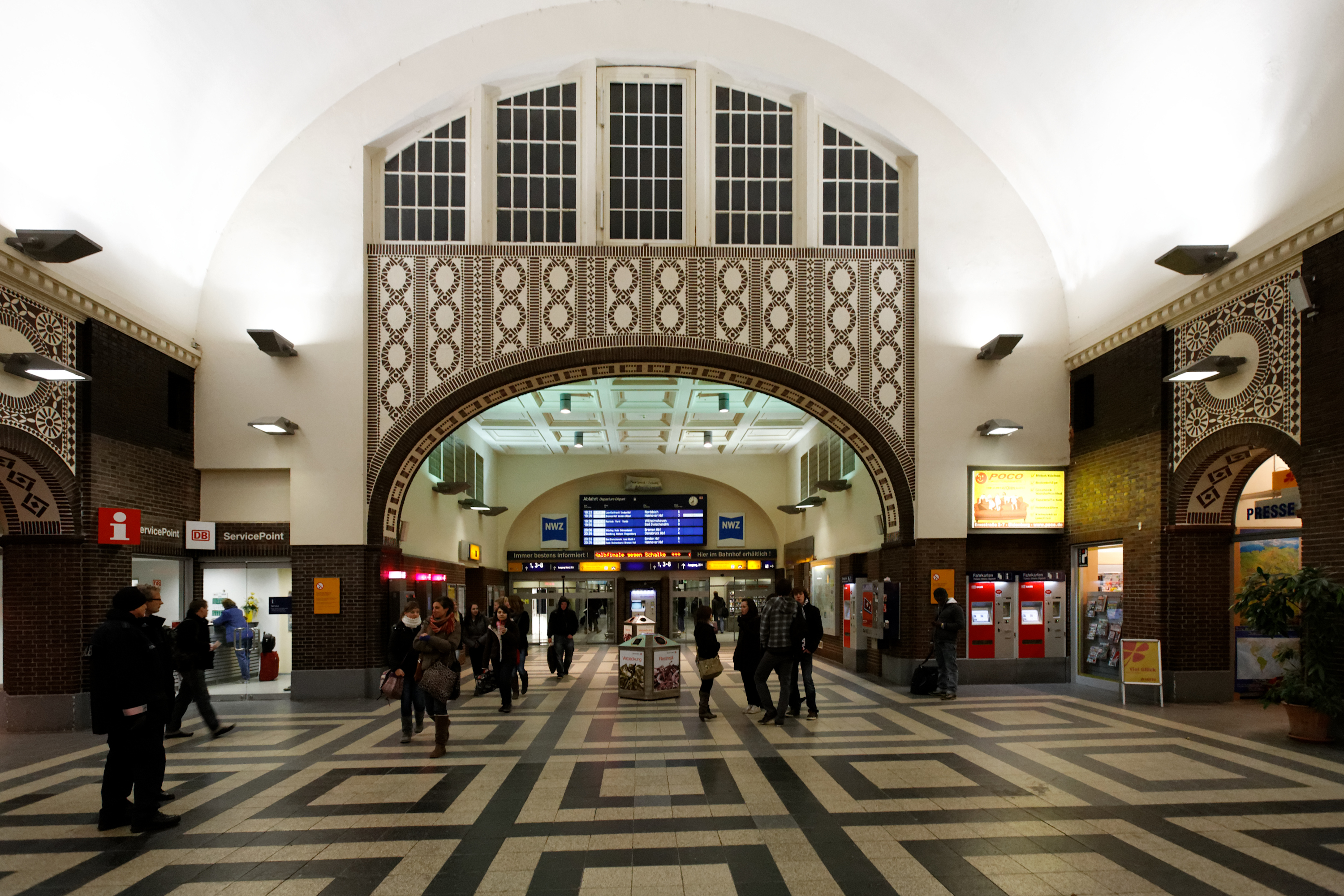 Innenansicht des Oldenburger Bahnhofs